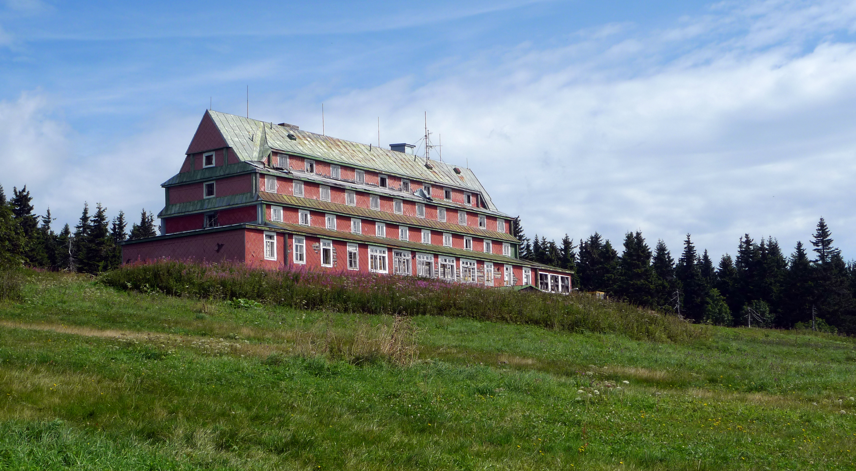 Sokolská bouda z Volské louky